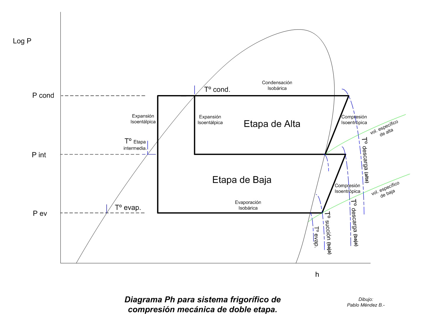 Diagrama Ph para sistema frigorífico de compresión mecánica de doble etapa.